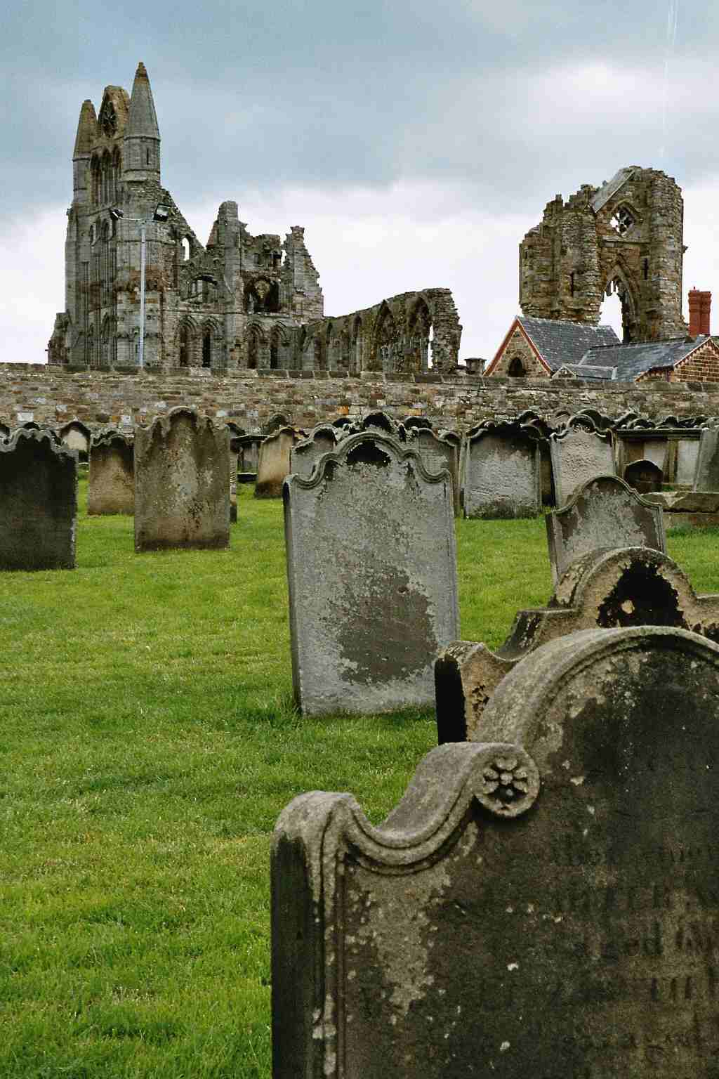 Whitby klosterruinene. Foto: AEK.